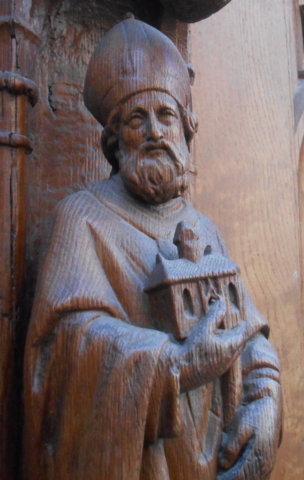 Saint Genès de Clermont, église Saint-Genès, Clermont-Ferrand.